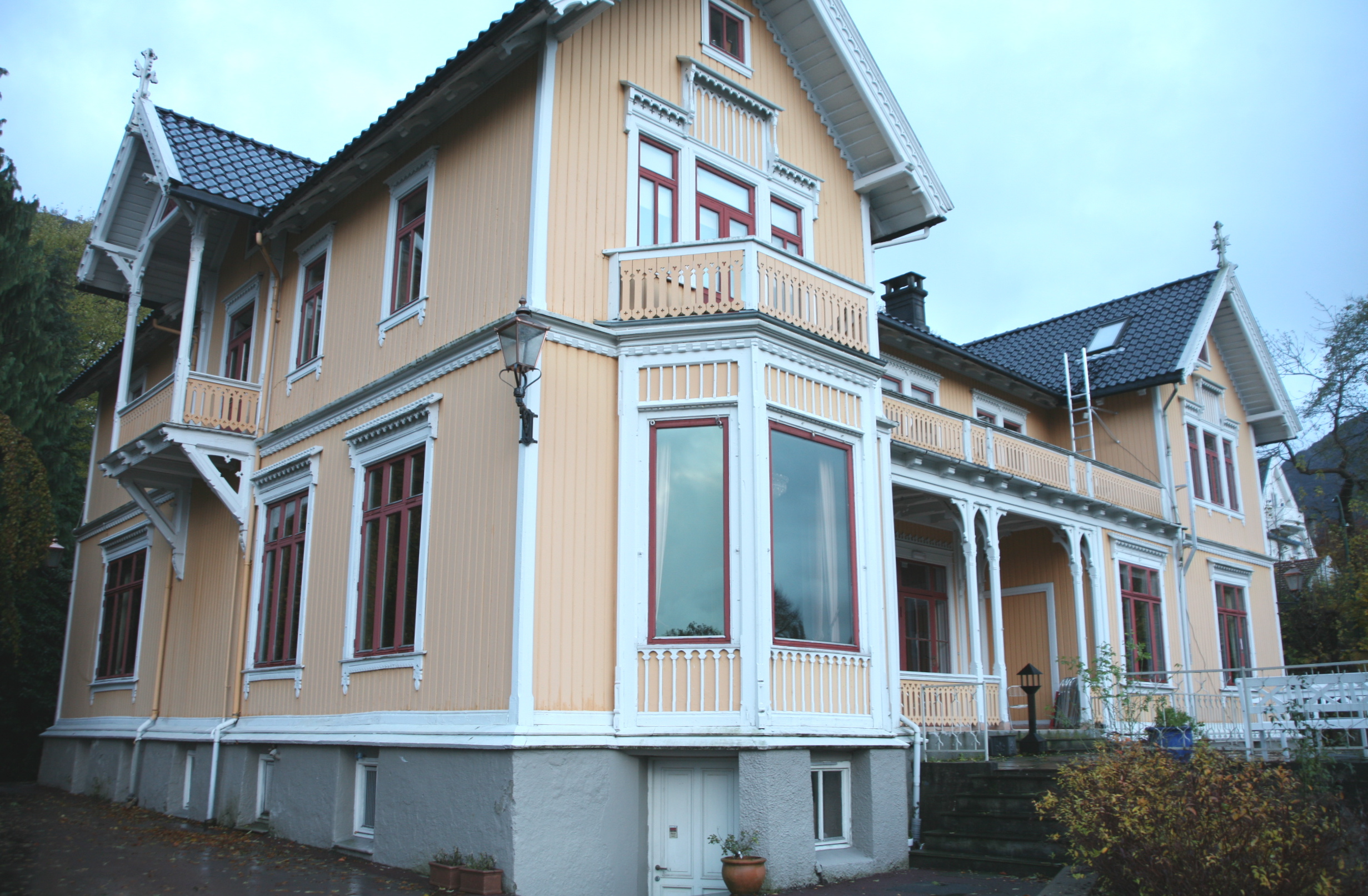 Villa in Kalfaret, Bergen